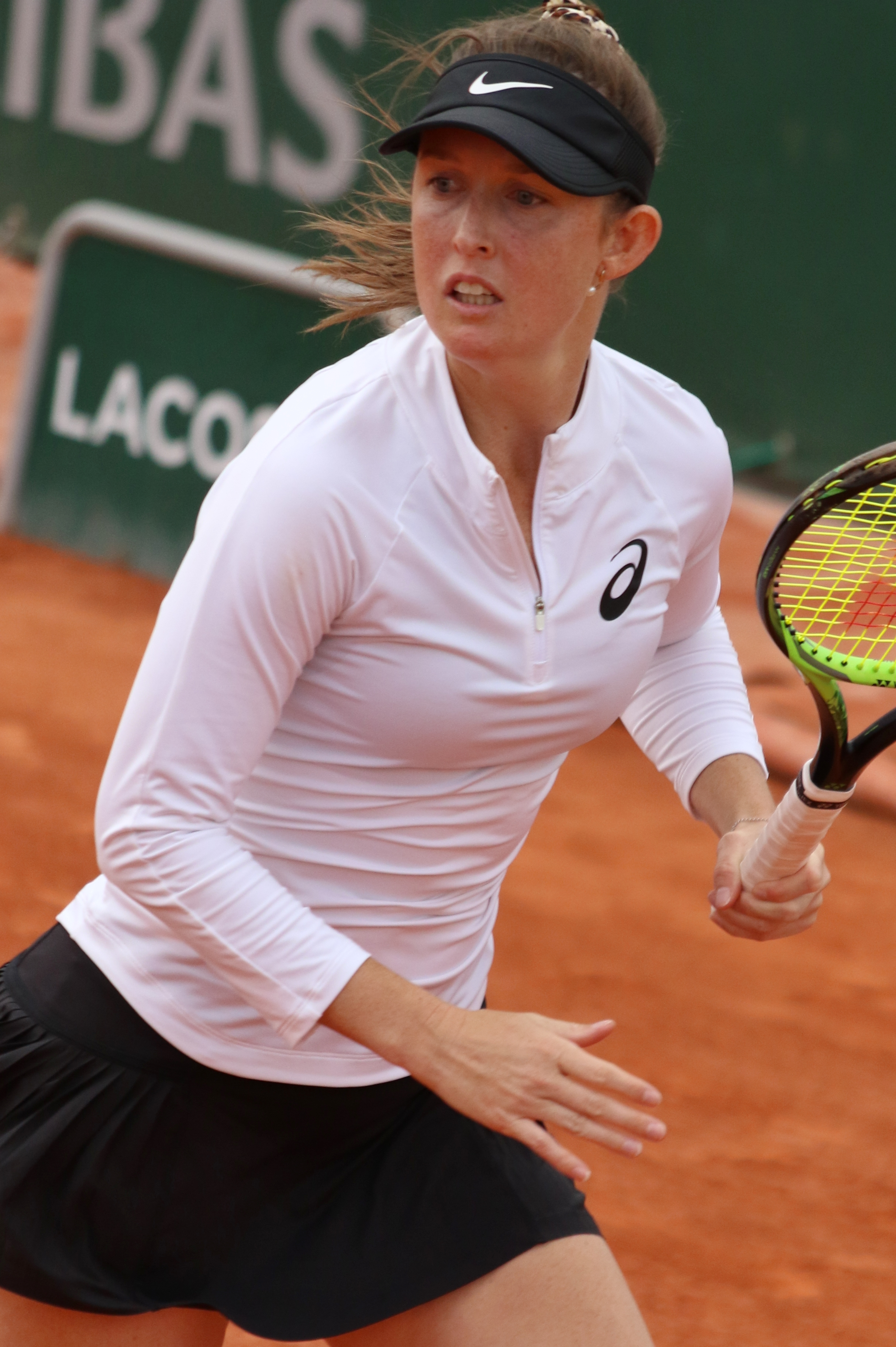 Sanders RG19 (29)